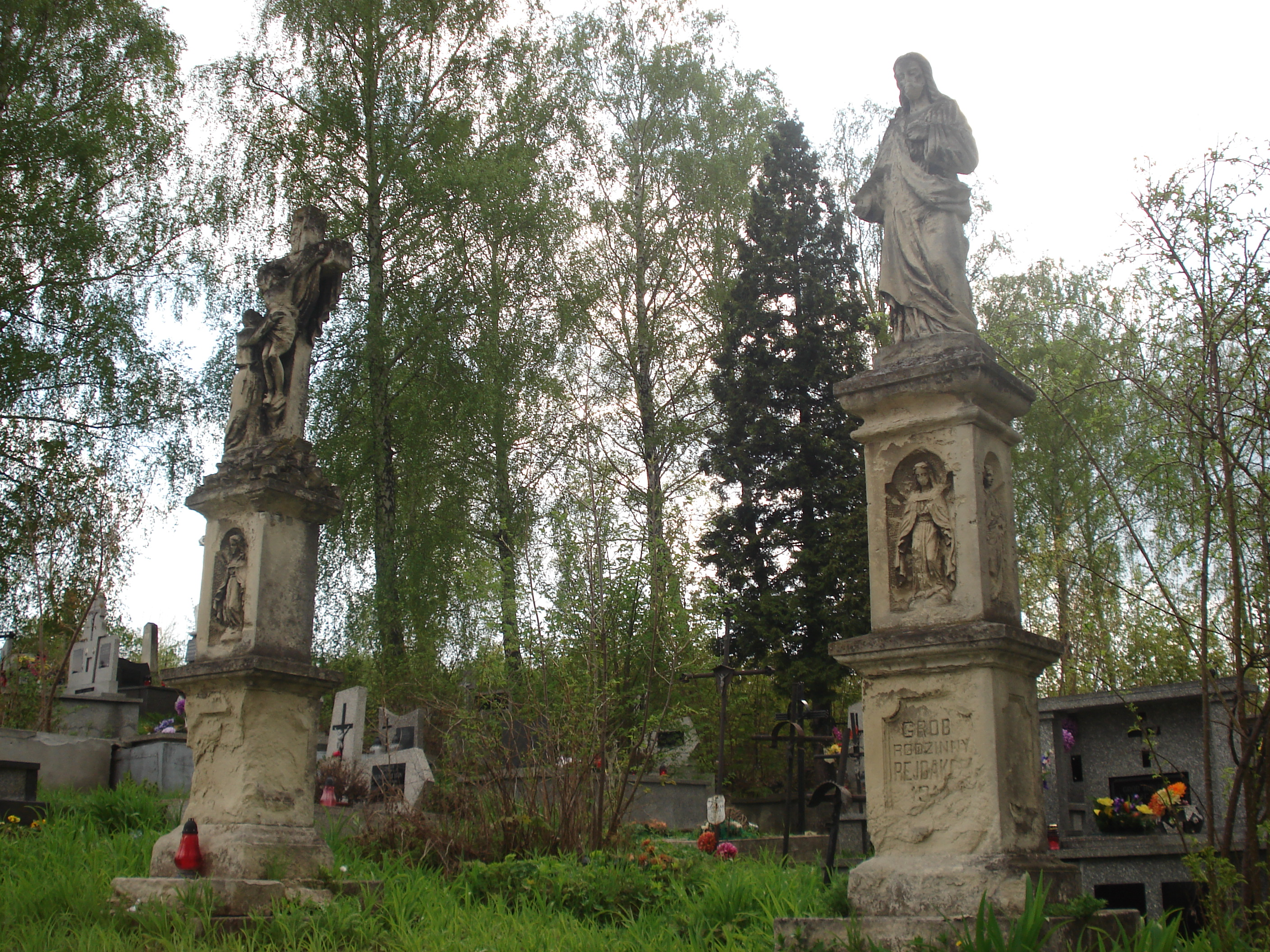 Stare nagrobki na cmentarzu w Skalbmierzu